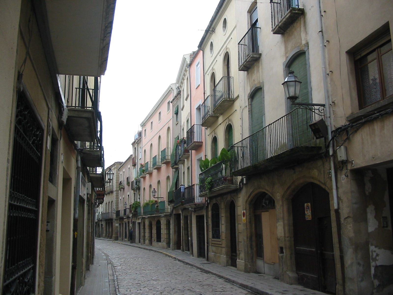 Carrers de Cervera (Catalunya)